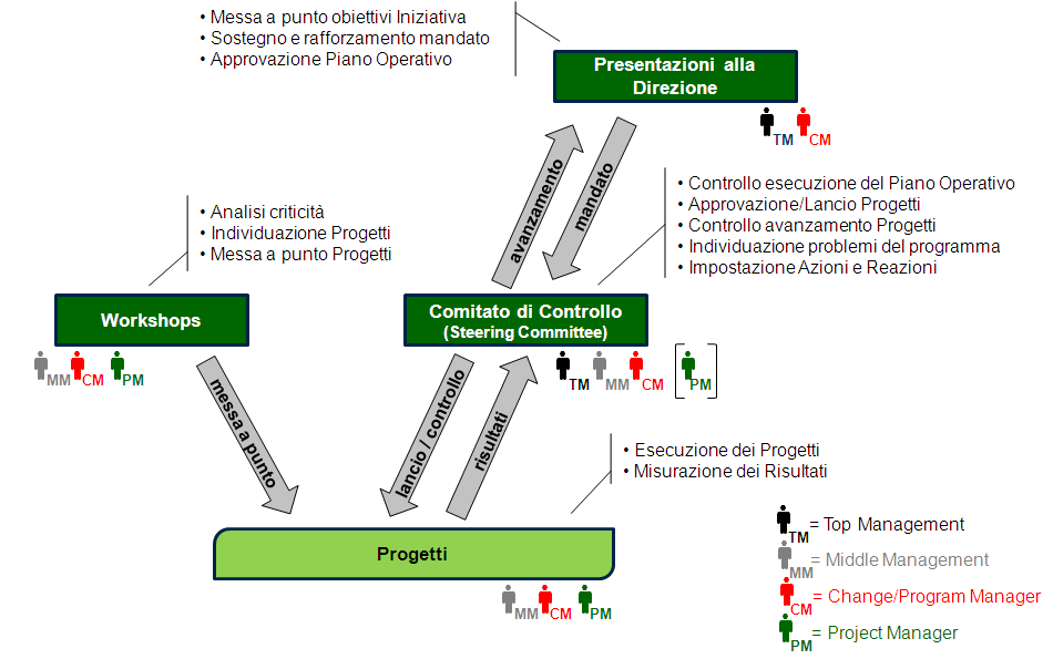 schema di governo programmi di Change Management